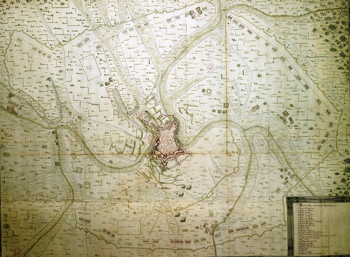 Belagerung von Luxemburg im Jahr 1684 (Stadtgrundriss und Umgebung mit Belagerungsstellungen, farbige Handzeichnung), Originaltitel: Plan de la Ville et du Siege de Luxemburg